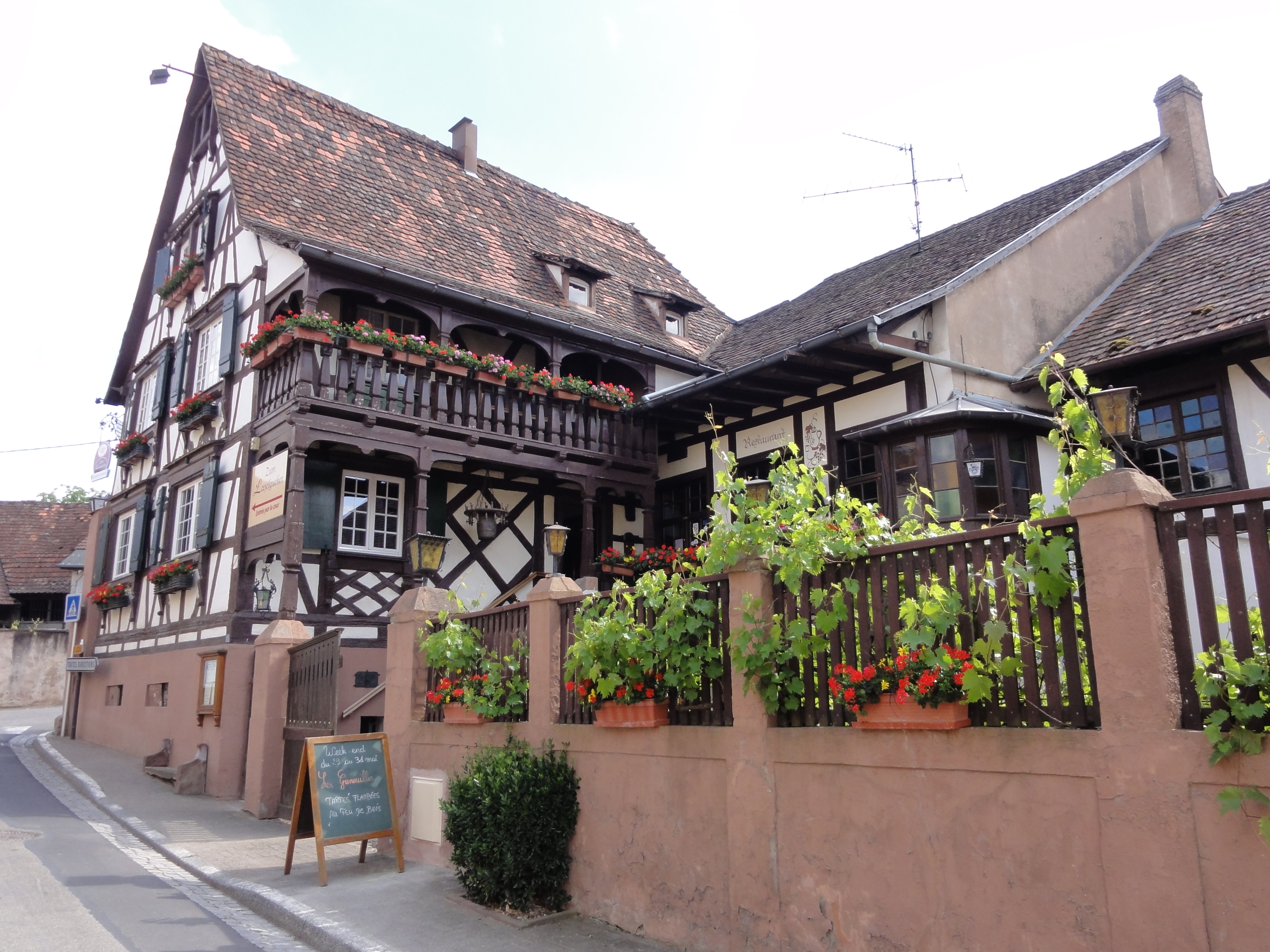 Alsace, Bas-Rhin, Traenheim, Restaurant (1549-1772), 17 rue Principale. .